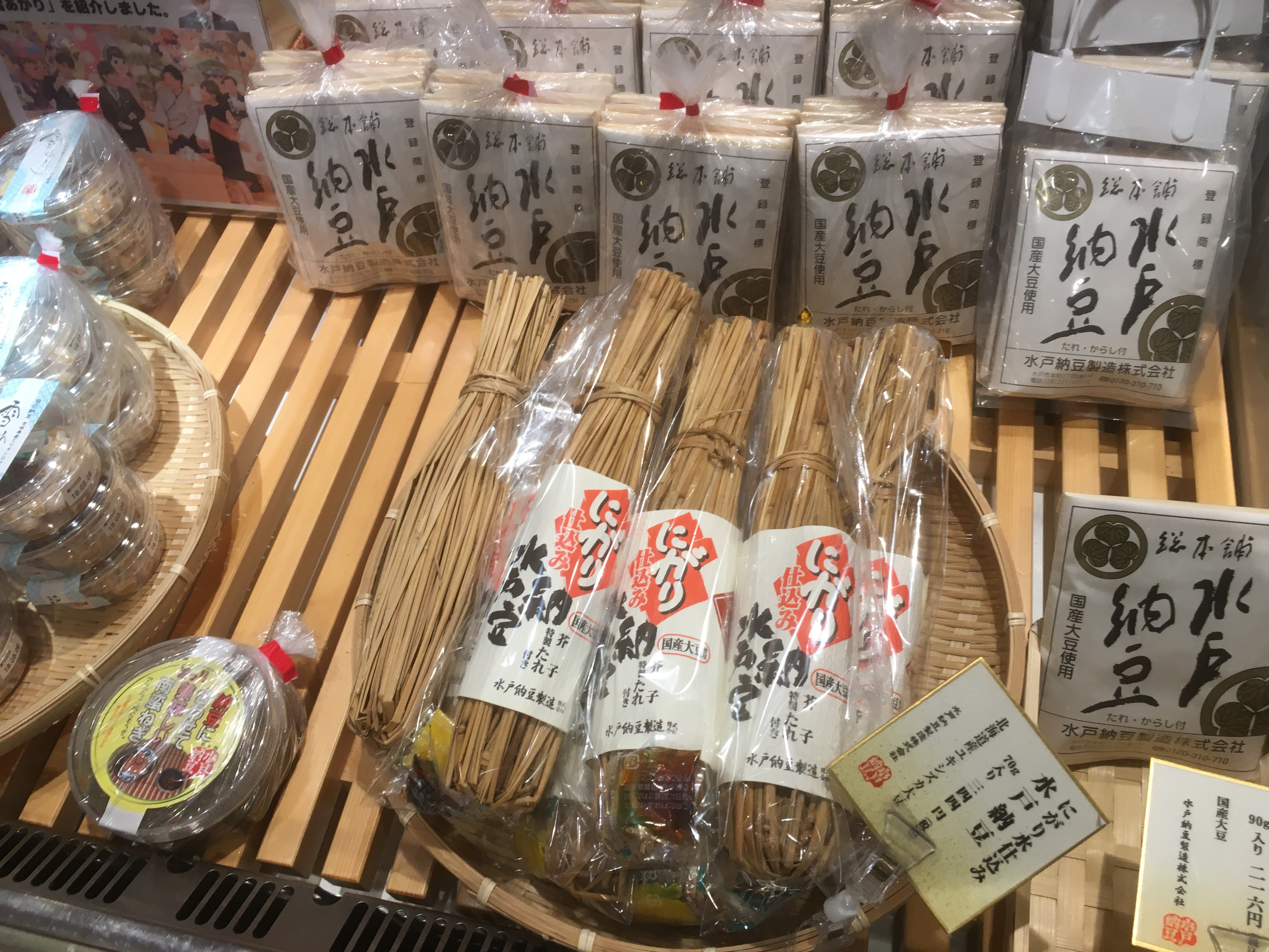 納豆、水戸市にて (Natto in Mito)